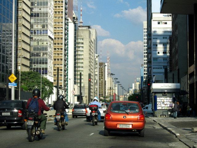 Avenida Paulista